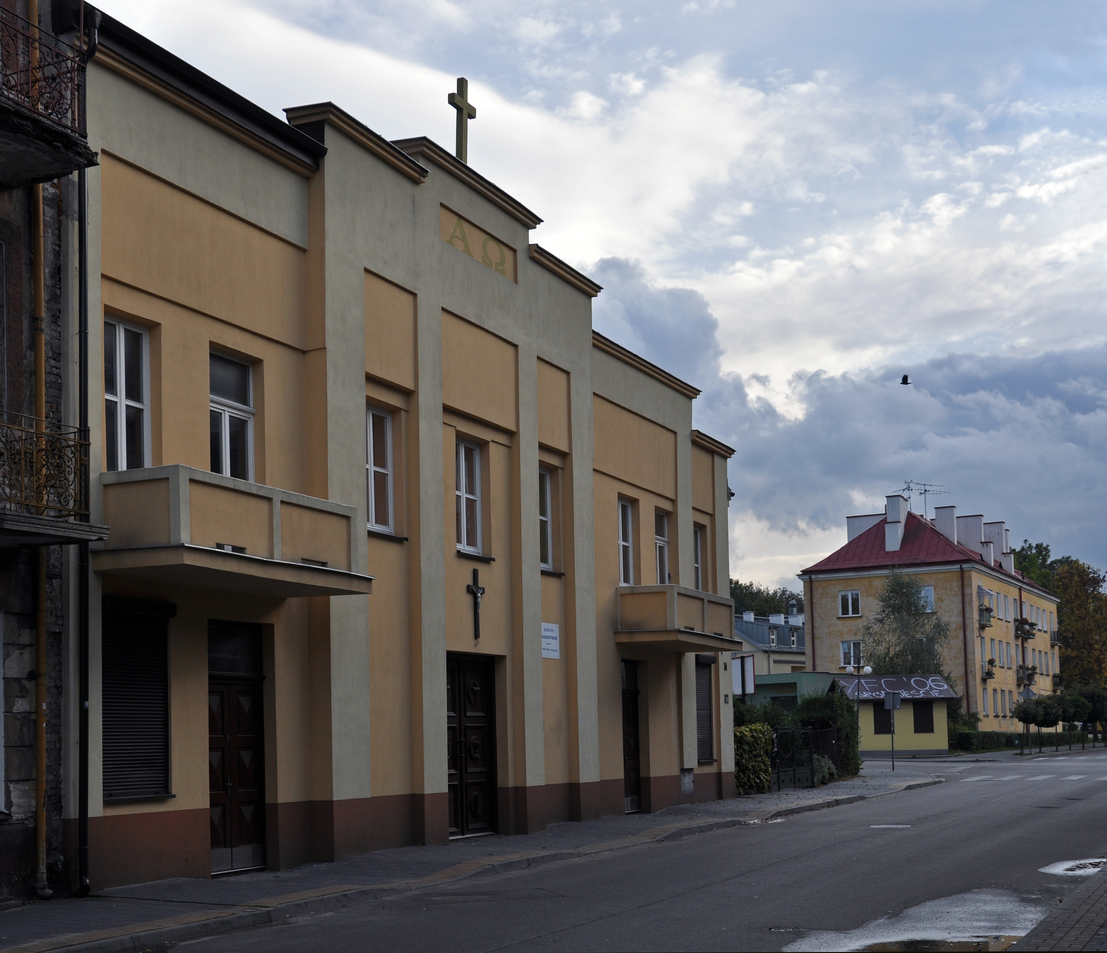 Chełm, kinoteatr Corso (Apollo), ob. kościół polsko-kat. p.w. Matki Boskiej Zwycięskiej, 1928, 1937, 1947